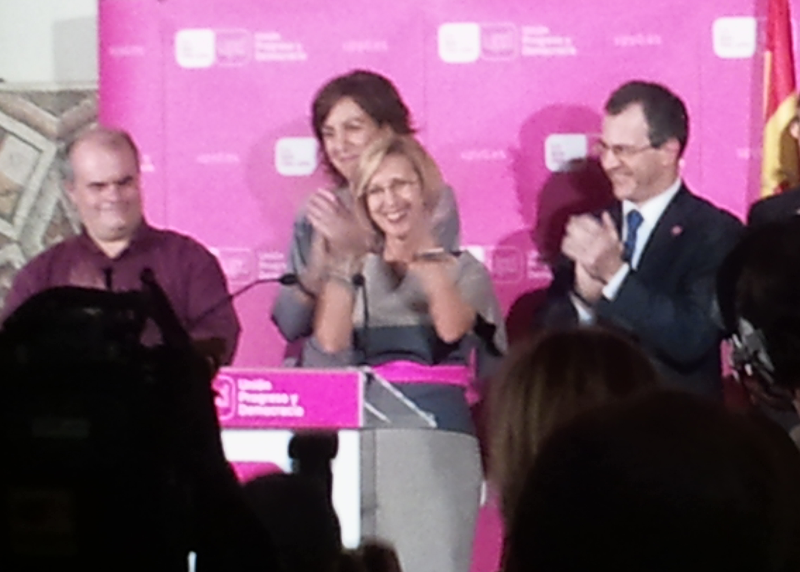 Celebración la noche electoral de las elecciones generales del 20 de noviembre de 2011, en el hotel Villareal en Madrid. Aparecen los cuatro diputados de UPyD elegidos por la circuscripción de Madrid (Carlos Martínez Gorriarán, Rosa Díez, Álvaro Anchuelo Crego y Irene Lozano Domingo. Eso noche UPyD obtuvo 5 diputados nacionales, el quinto por Valencia (Toni Cantó).